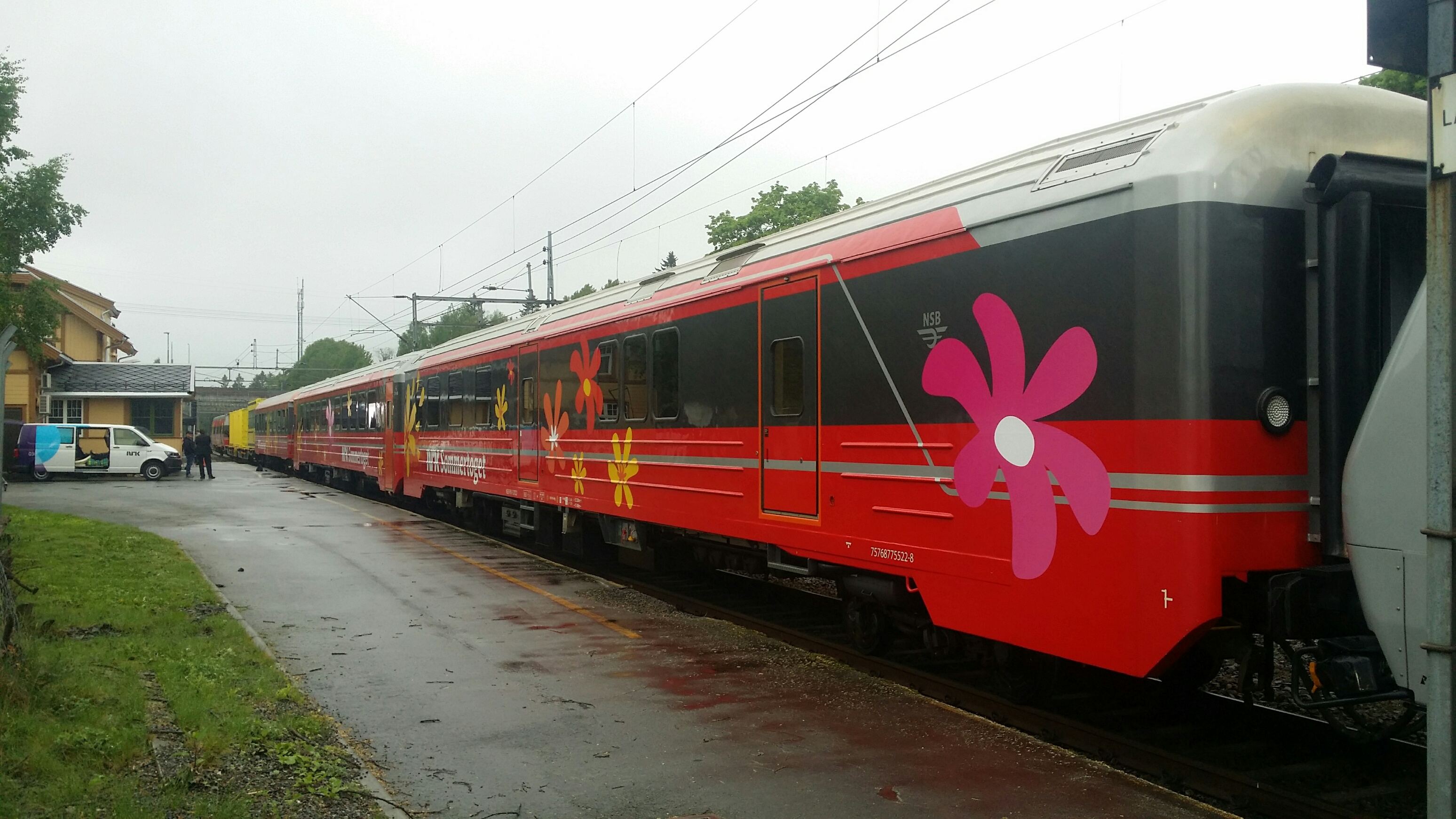 Lørenskog stasjon 30. mai 2017.Prøving, innspilling av forfilmer og quiz-er etc.